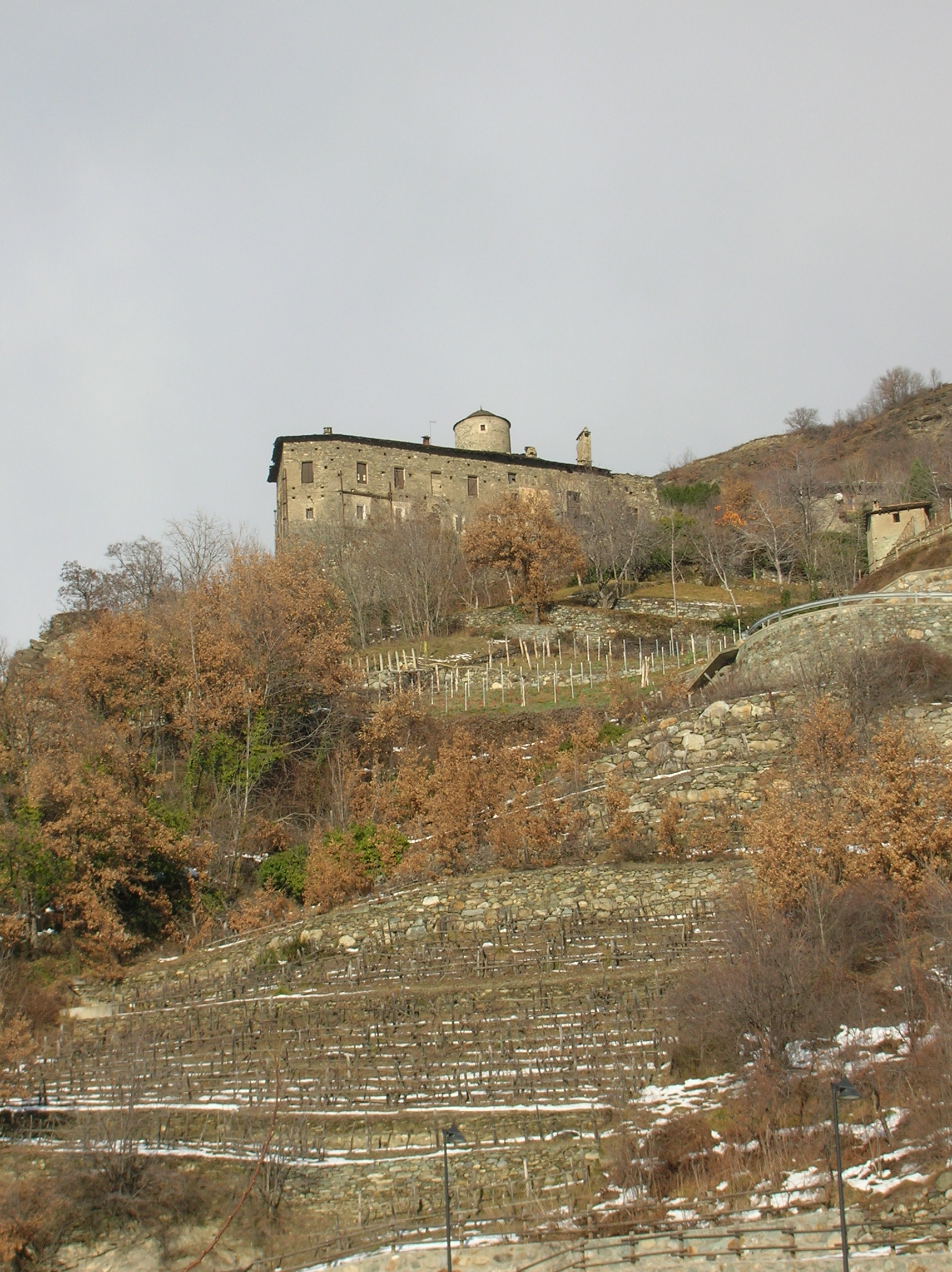 Il castello di Nus si trova sopra la frazione Plane di Nus all'imbocco della Valle di Saint-Barthélemy. Nus, Valle d'Aosta, Italia.